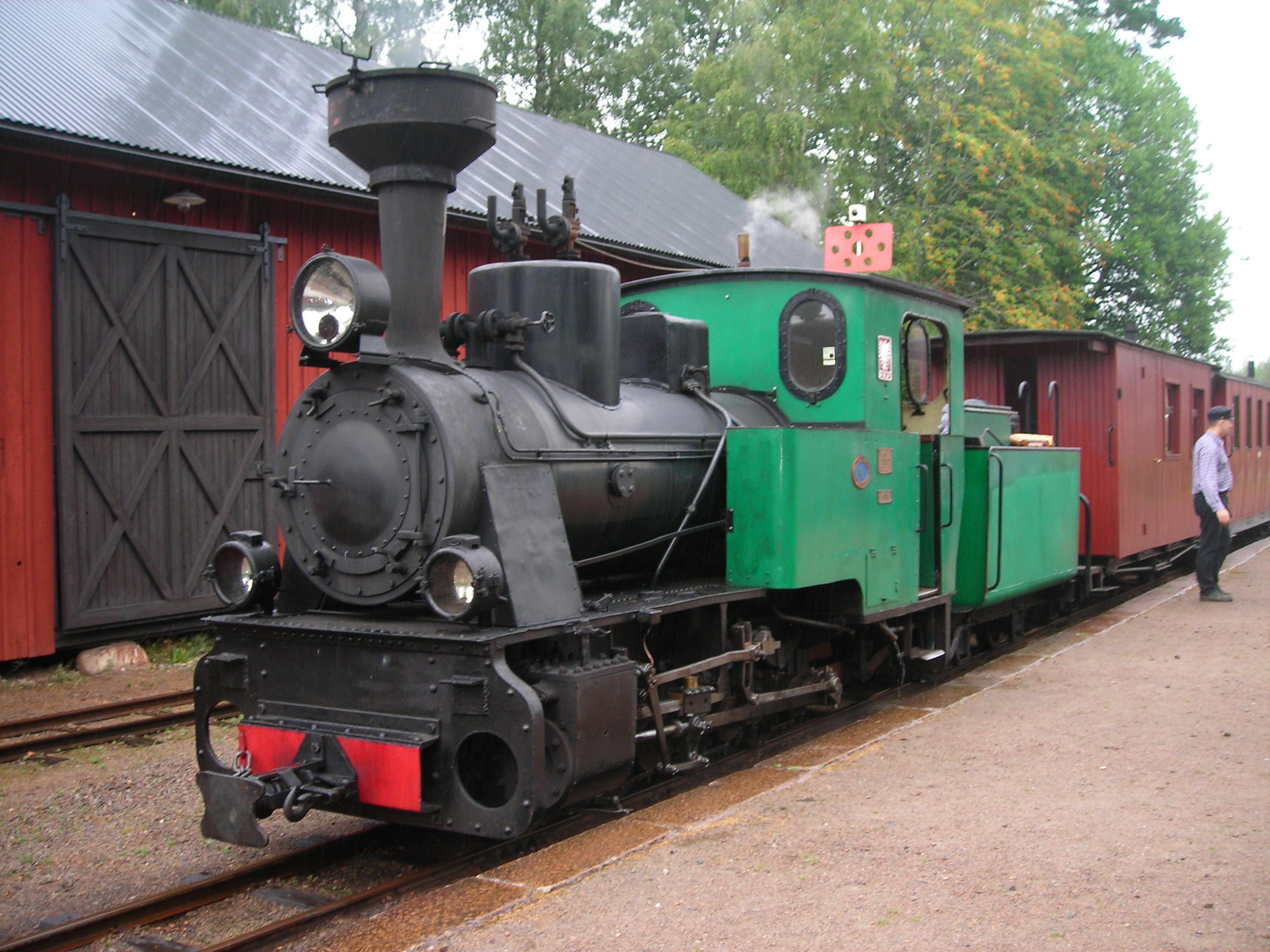 Lok 1 Ohsabanan